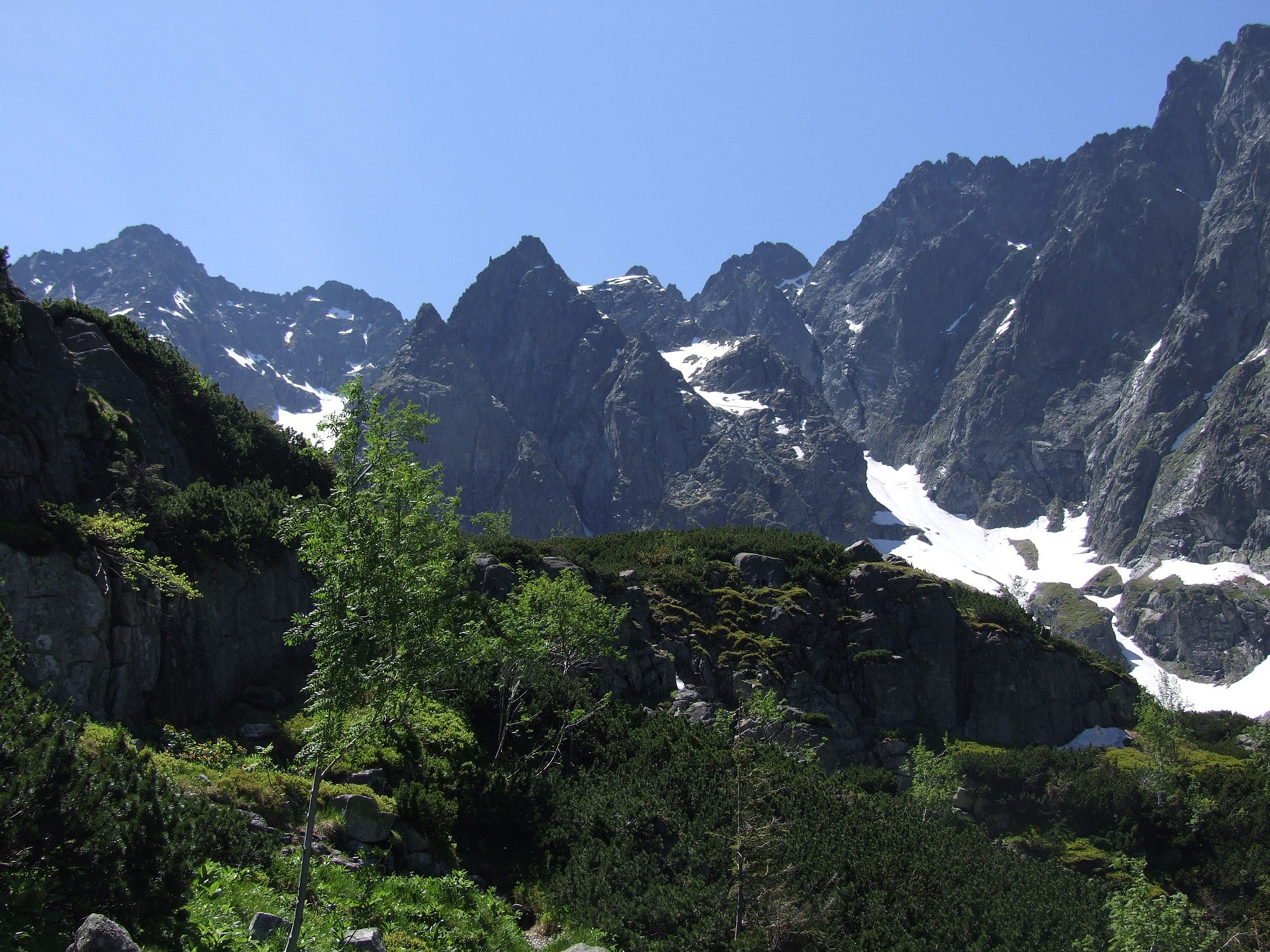 Dolina Kacza w słowackich Tatrach wysokich. Widoczne: Zmarzły Szczyt, Żelazne Wrota, Zasłonista Turnia, Kaczy Żleb i próg skalny doliny